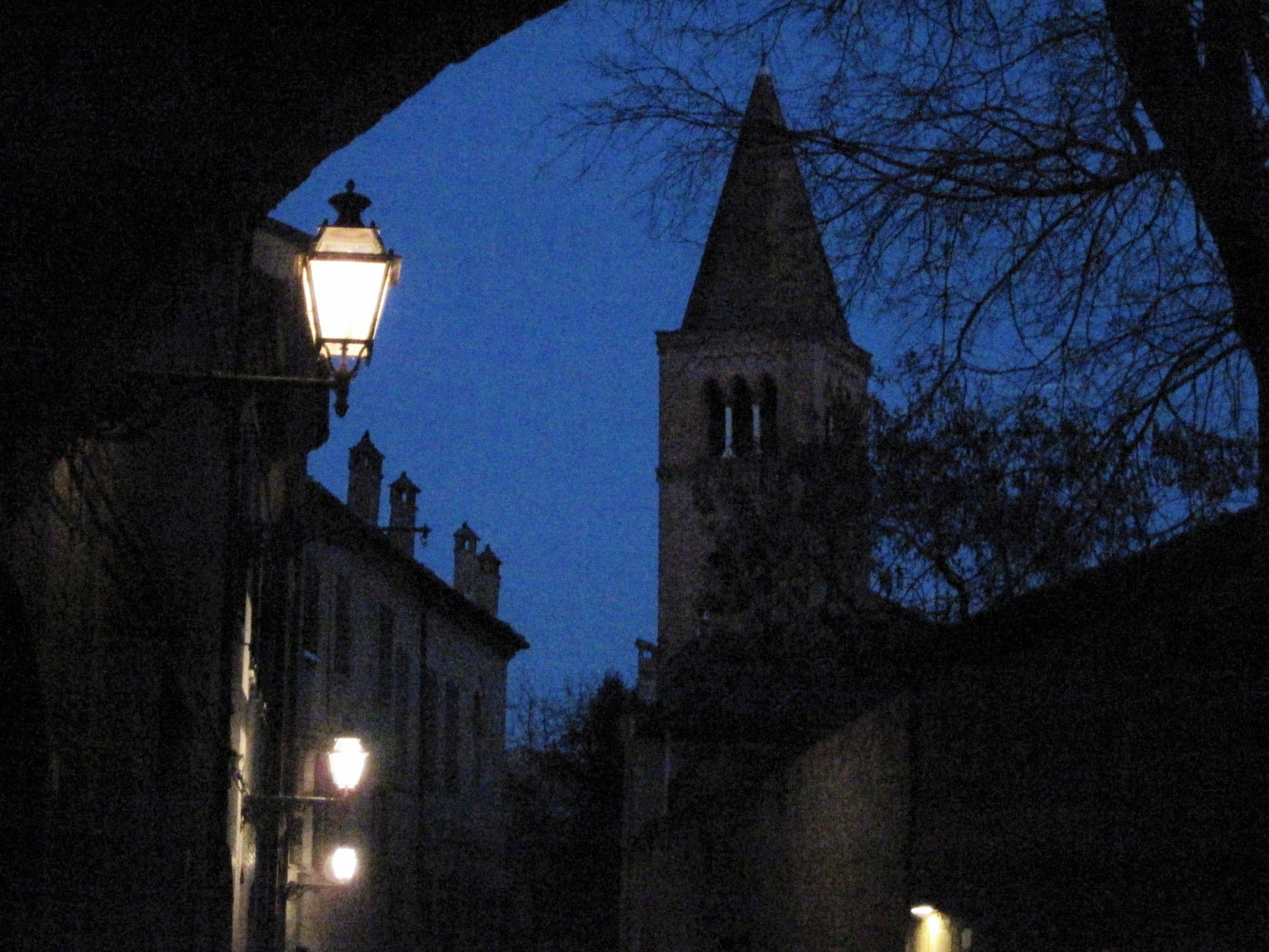 Antica via appartenente al nucleo urbanistico medievale della città di Ferrara